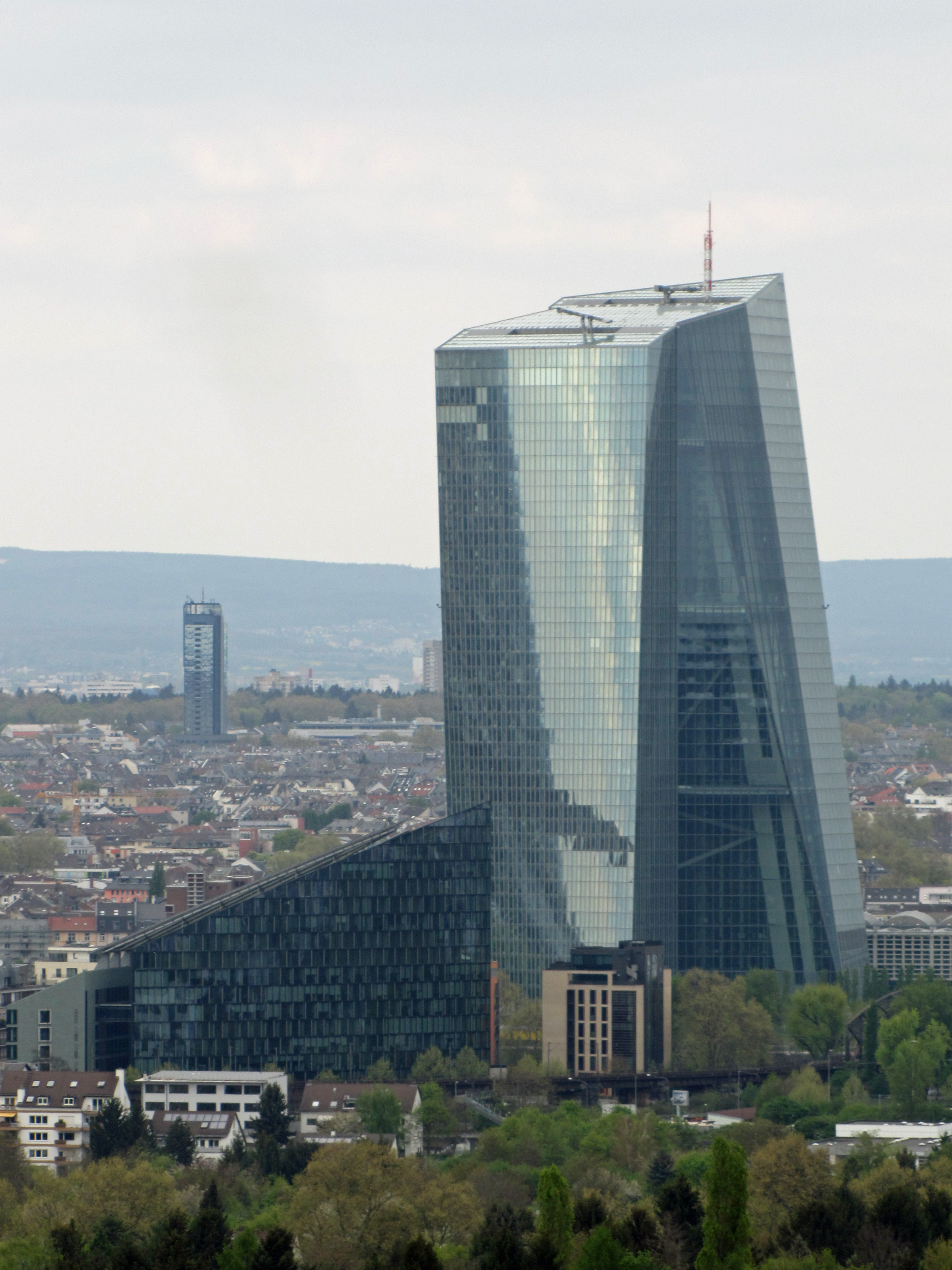 Die EZB-Zentrale mit der Main Triangel im Vordergrund. Im April 2017 vom Goetheturm aus gesehen.